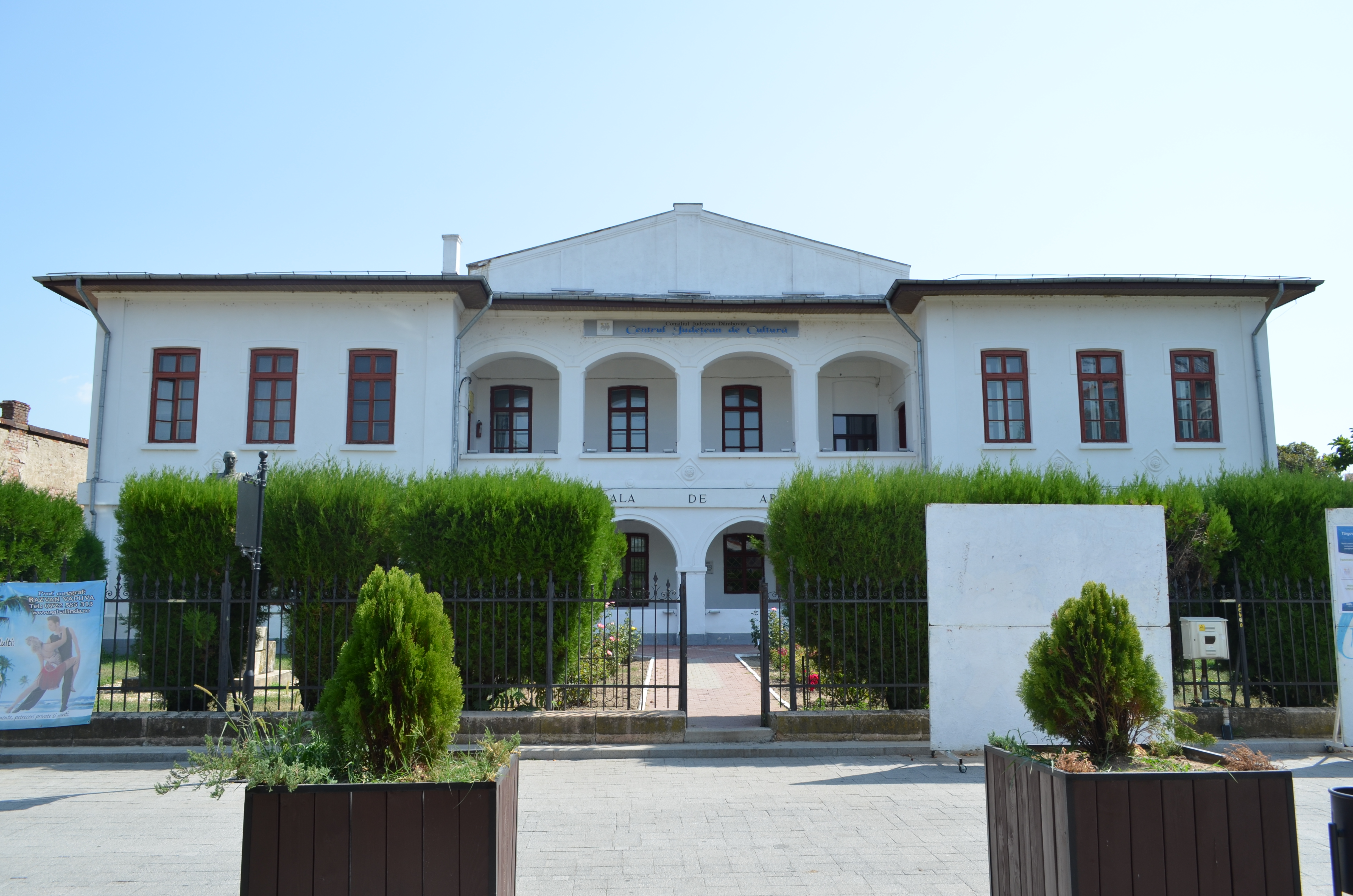 Școala "Vasile Cârlova", azi Centrul Județean de Cultură Dâmbovița, Str. Alexandru Ioan Cuza nr. 15, Târgoviște